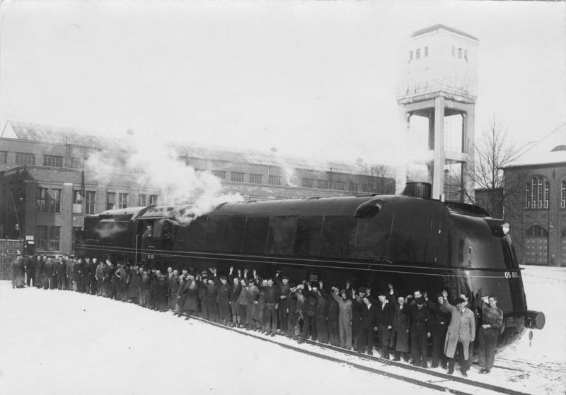 Die schnellste Stromlinienlokomotive der Welt wurde in den Borsigwerken in Berlin-Tegel für die Deutsche Reichsbahn fertiggestellt. Die Maschine hat eine Leistung von 175 Stundenkilometern bei 2800 PS. Die riesigen Ausmaße der Maschine mit einer Länge von 26 m veranschaulichen die deutschen Werkarbeiter vor ihrer Lokomotive, der schnellsten der Welt.